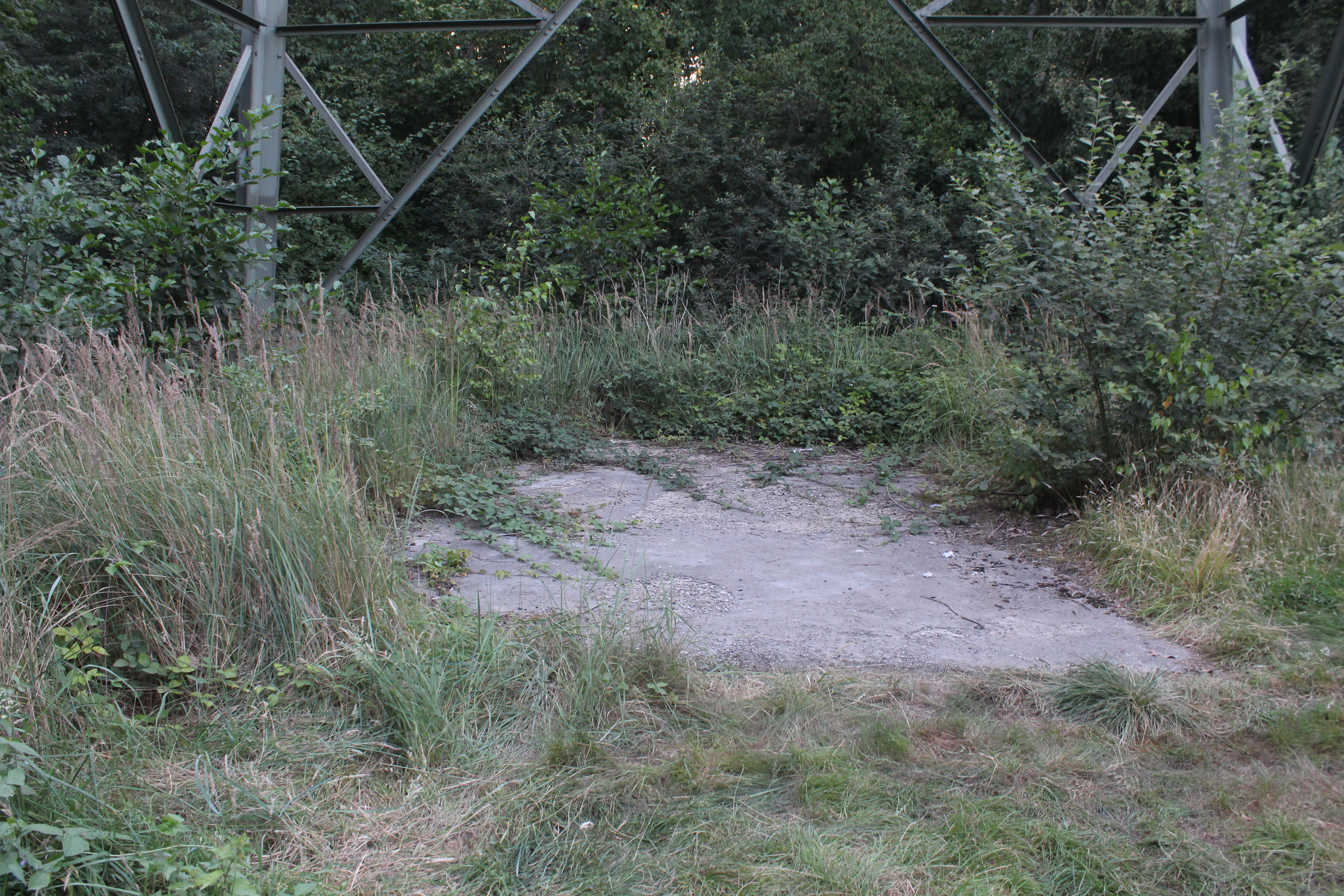 Füsse des Mastes 93 der Anlage 4101 mit der Betonplatte unter dessen Beinen, auf der früher ein Stahlgerüst mit einem Treppenaufgang zur einstigen Aussichtskanzel stand